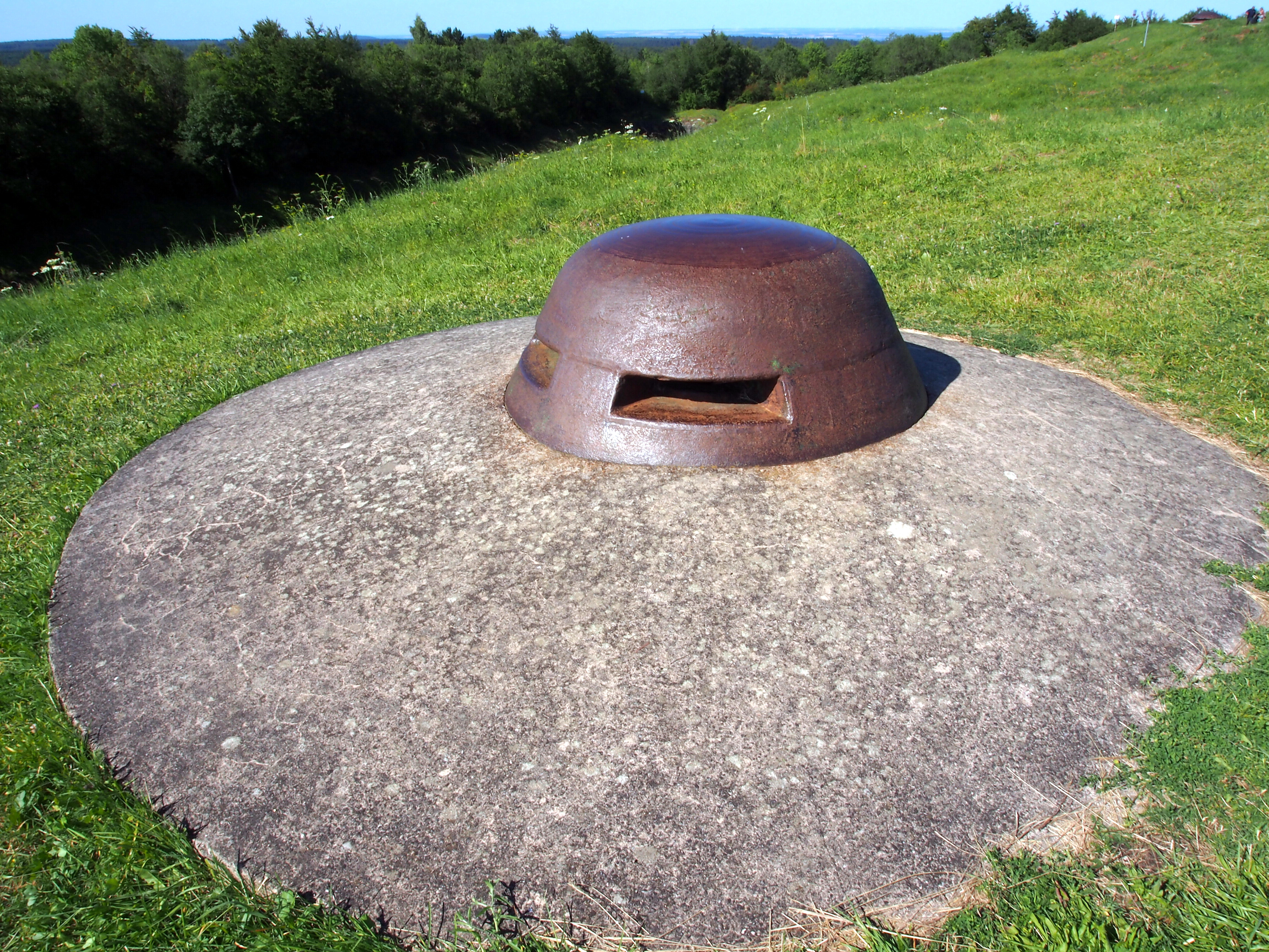 Fort de Douaumont, Kazemat